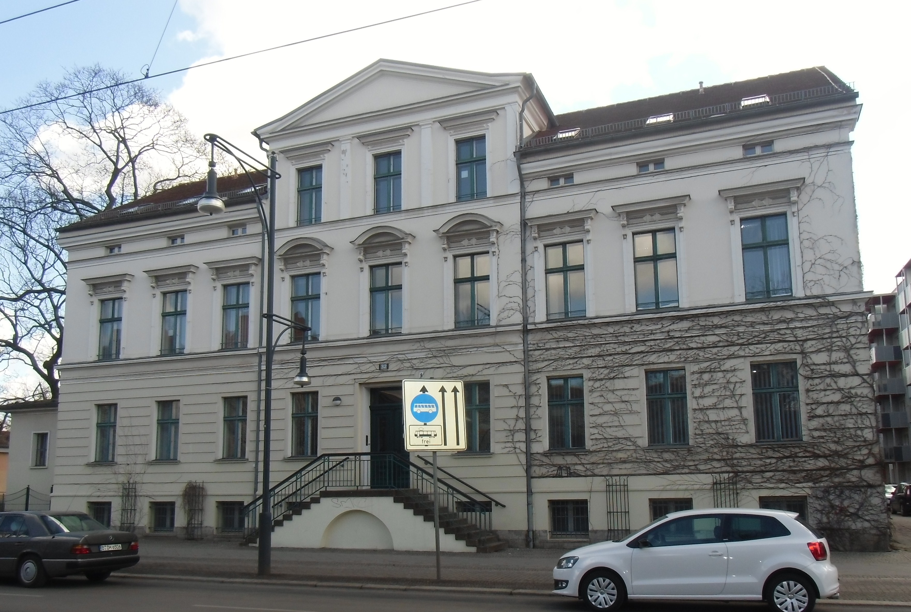 Denkmalgeschütztes Wohnhaus, erbaut um 1880